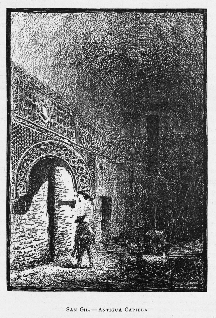 Iglesia de San Gil, antigua capilla, en Guadalajara.